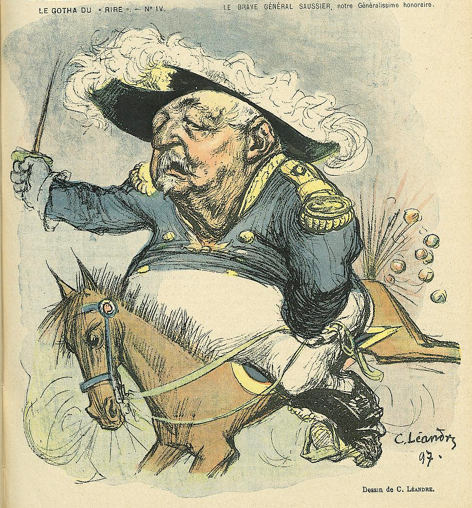 Le général Saussier, gouverneur militaire de Paris, caricaturé par Charles Léandre dans Le Rire, 15 janvier 1898. Légende : Le brave général Saussier, notre généralissime honoraire.